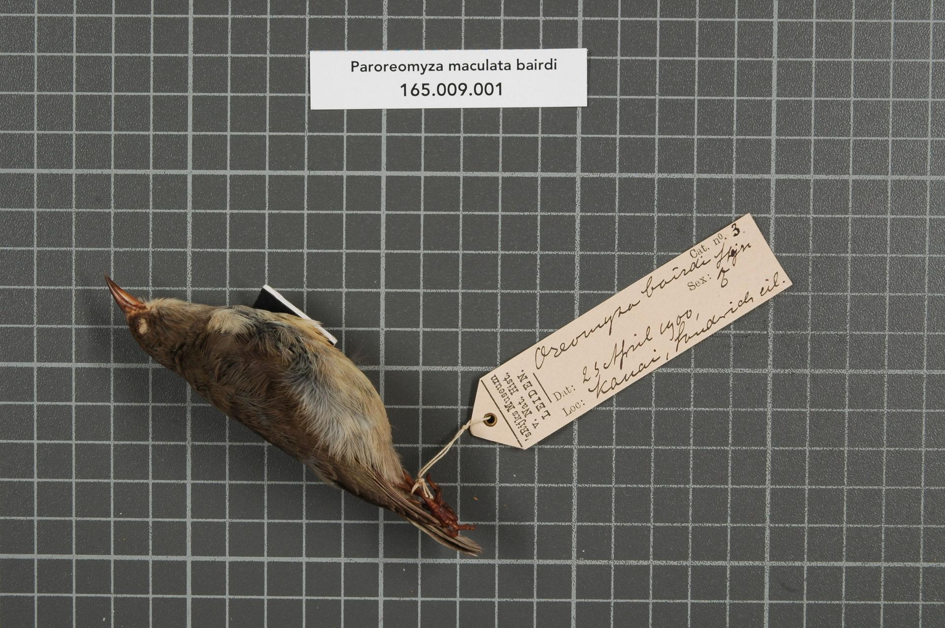 Paroreomyza maculata bairdi (Stejneger, 1887)